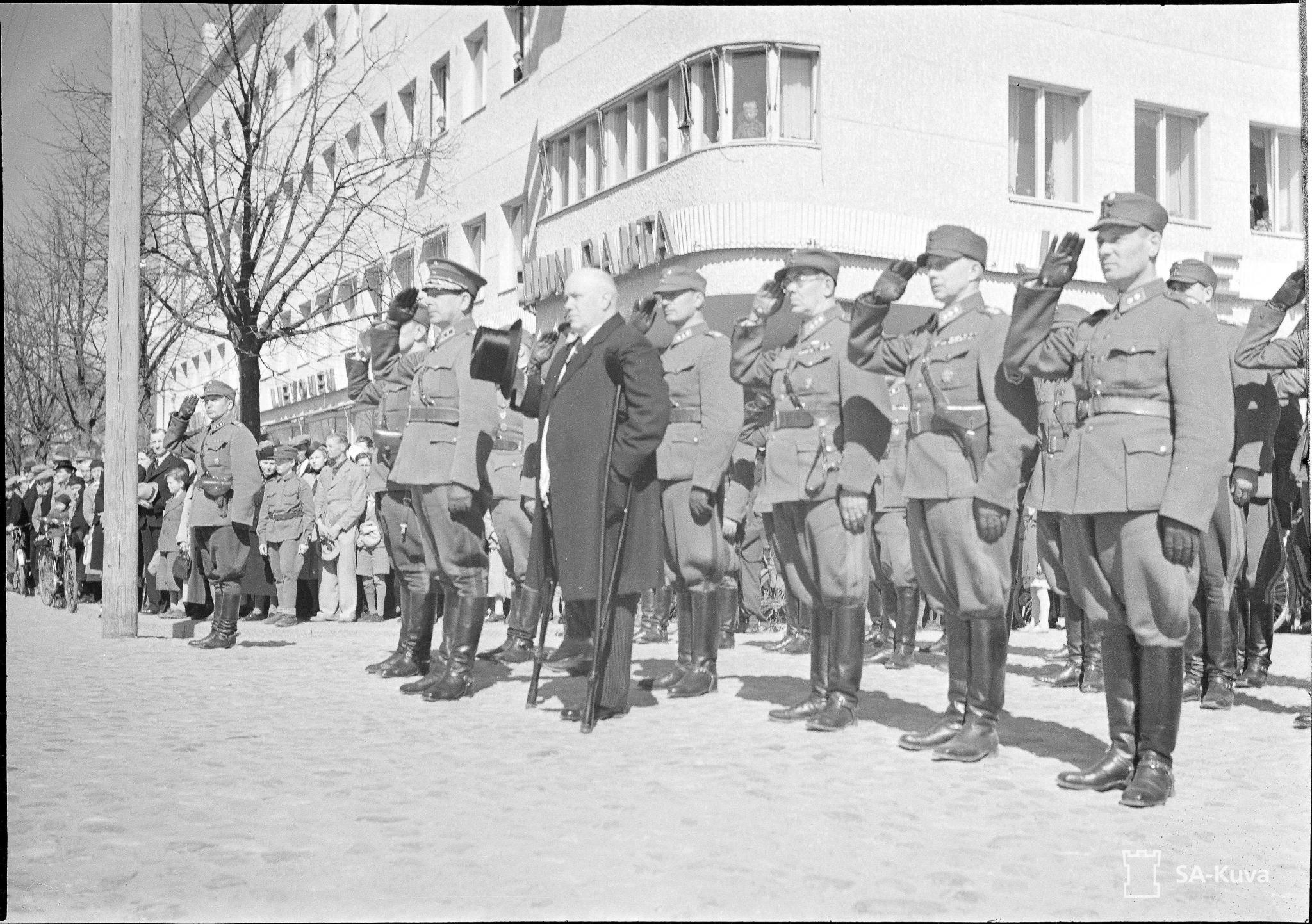 Ohimarssi Joensuussa 19.5.1940 Äärimmäisenä vasemmalla paraatiakomentanut everstiluutnantti Eino Virkki. Toinen rivi vasemmalta eversti Aaro Pajari, eversti Antero Svensson, eversti Kaarlo Heiskanen, eversti August Kuistio ja eversti Aarne Sainio.